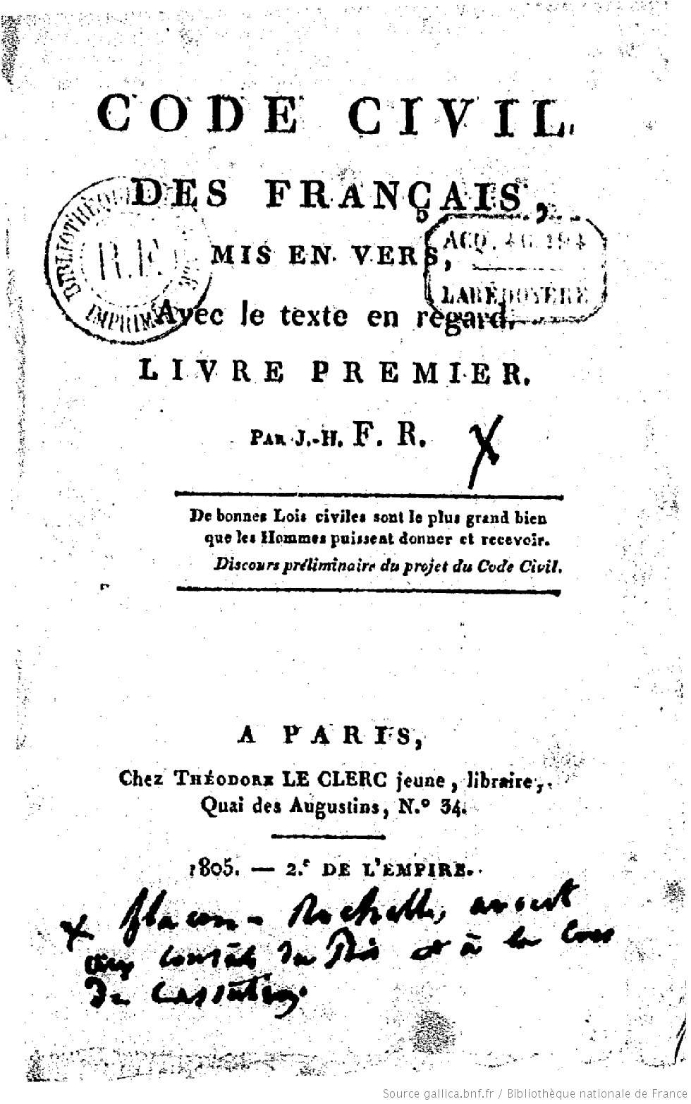 page de couverture du livre "Code civil des français en vers" de Rochelle Joseph-Henri